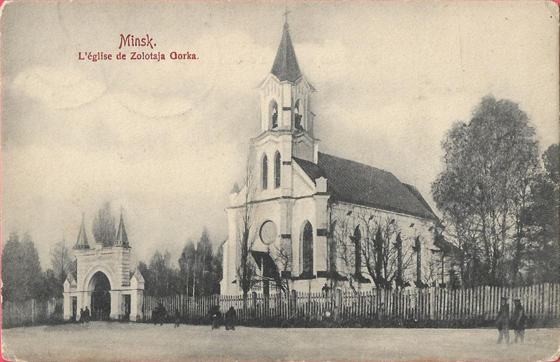 Беларуская (тарашкевіца): Менск (Miensk), Залатая Горка (Załataja Horka). Касьцёл Найсьвяцейшай Тройцы